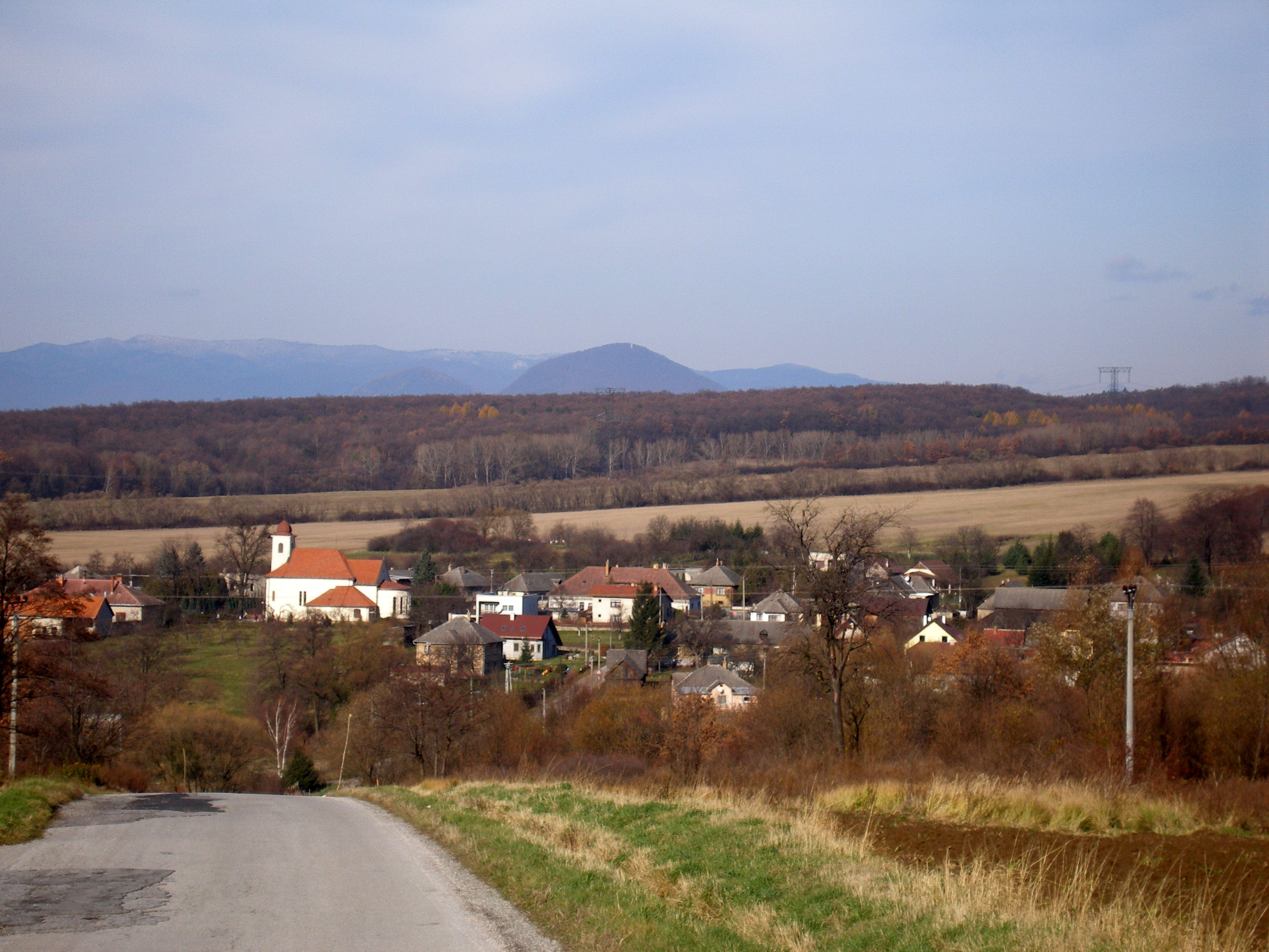 Obec Kokošovce v okrese Prešov